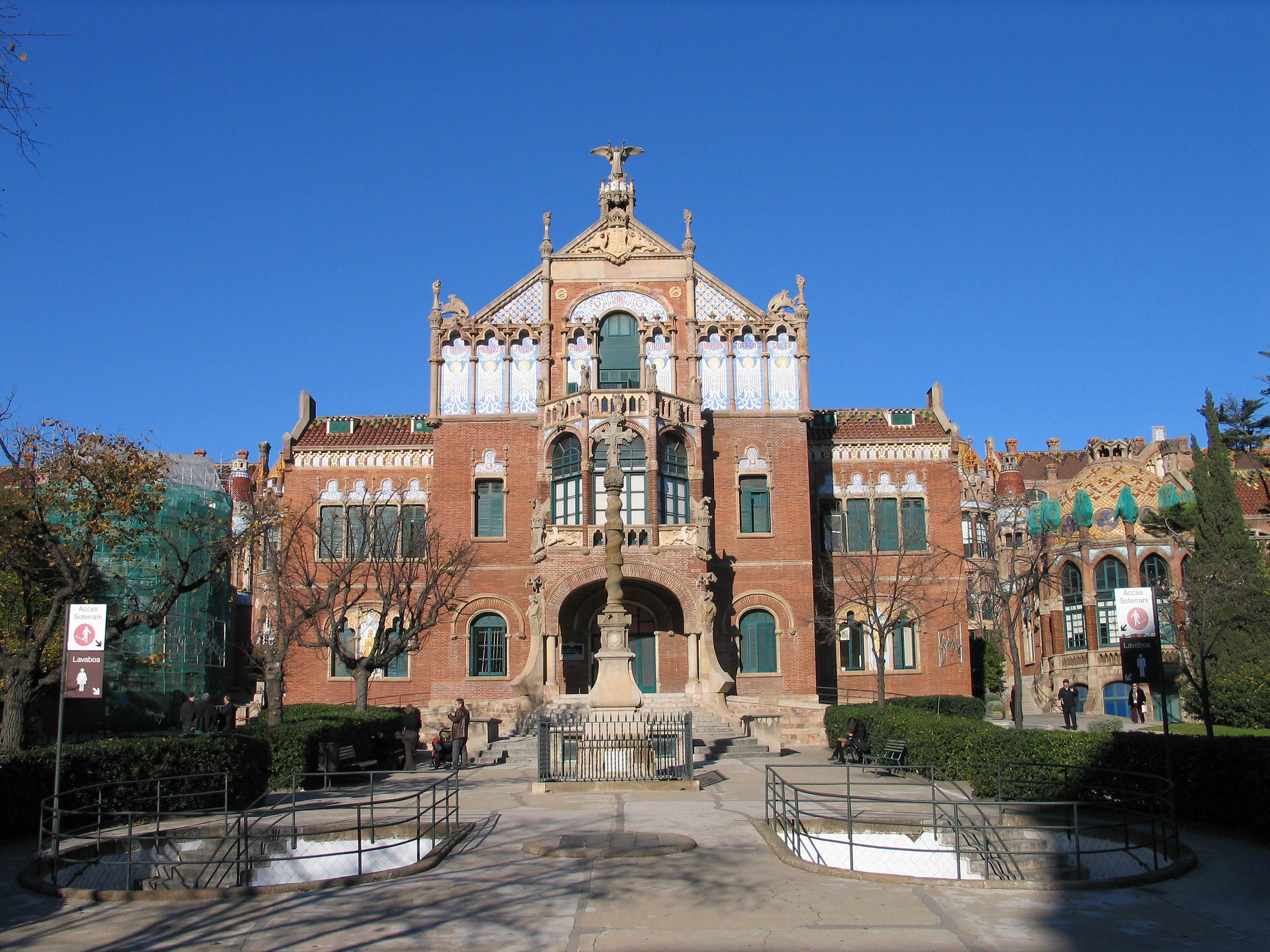 Hospital de Santa Creu i Sant Pau, Barcelona Photograph: Luidger (25. Dezember 2006)